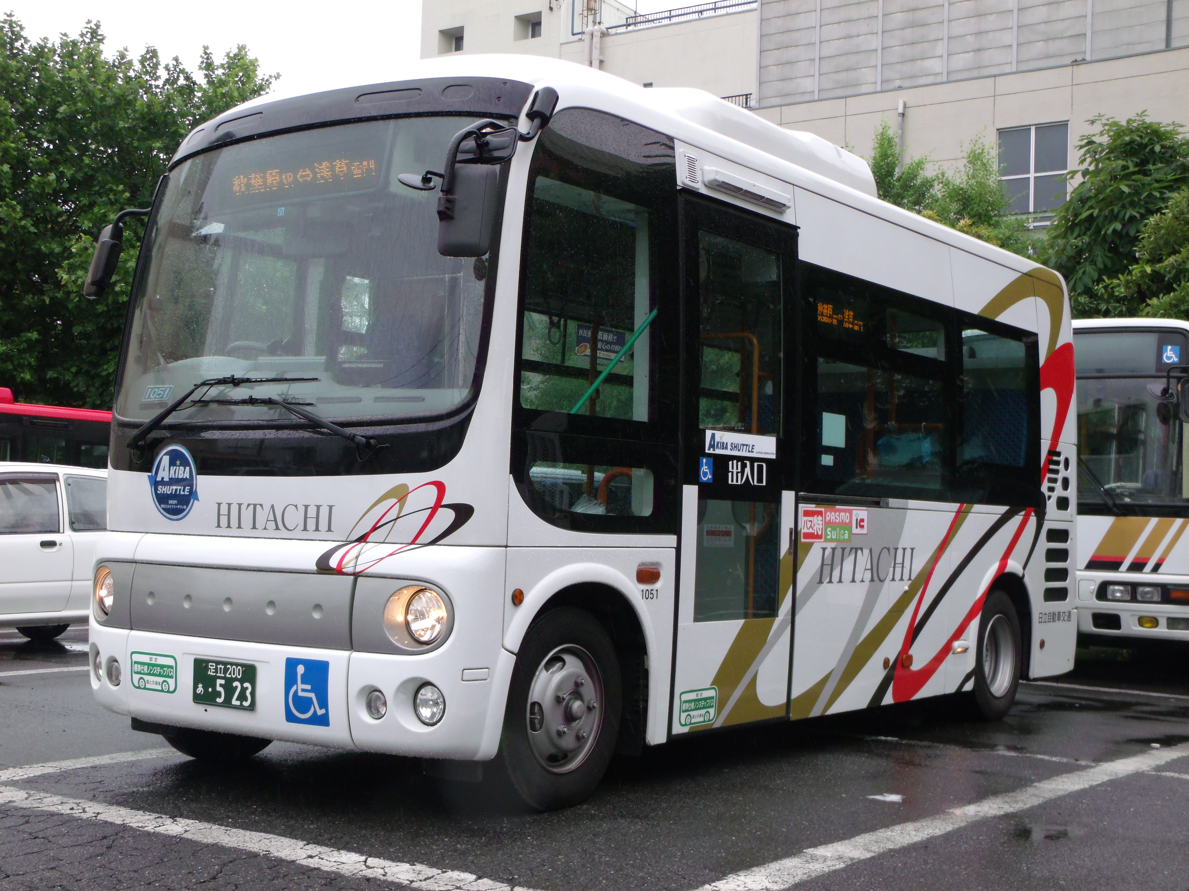 「AKIBA SHUTTLE」に使用される"日野・ポンチョ（ショート）”